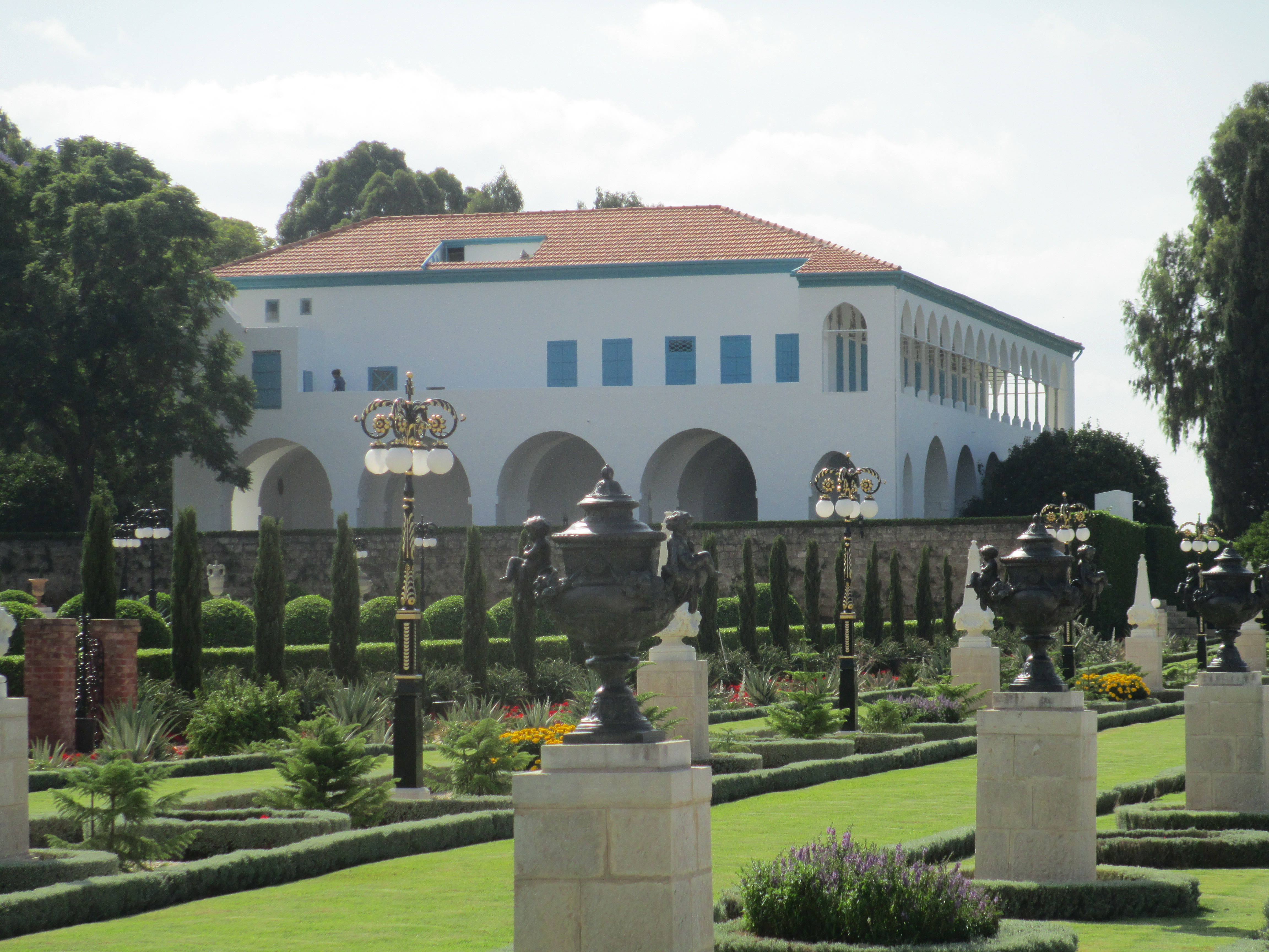 בית בהאא אוללה בגני הבהאים בעכו